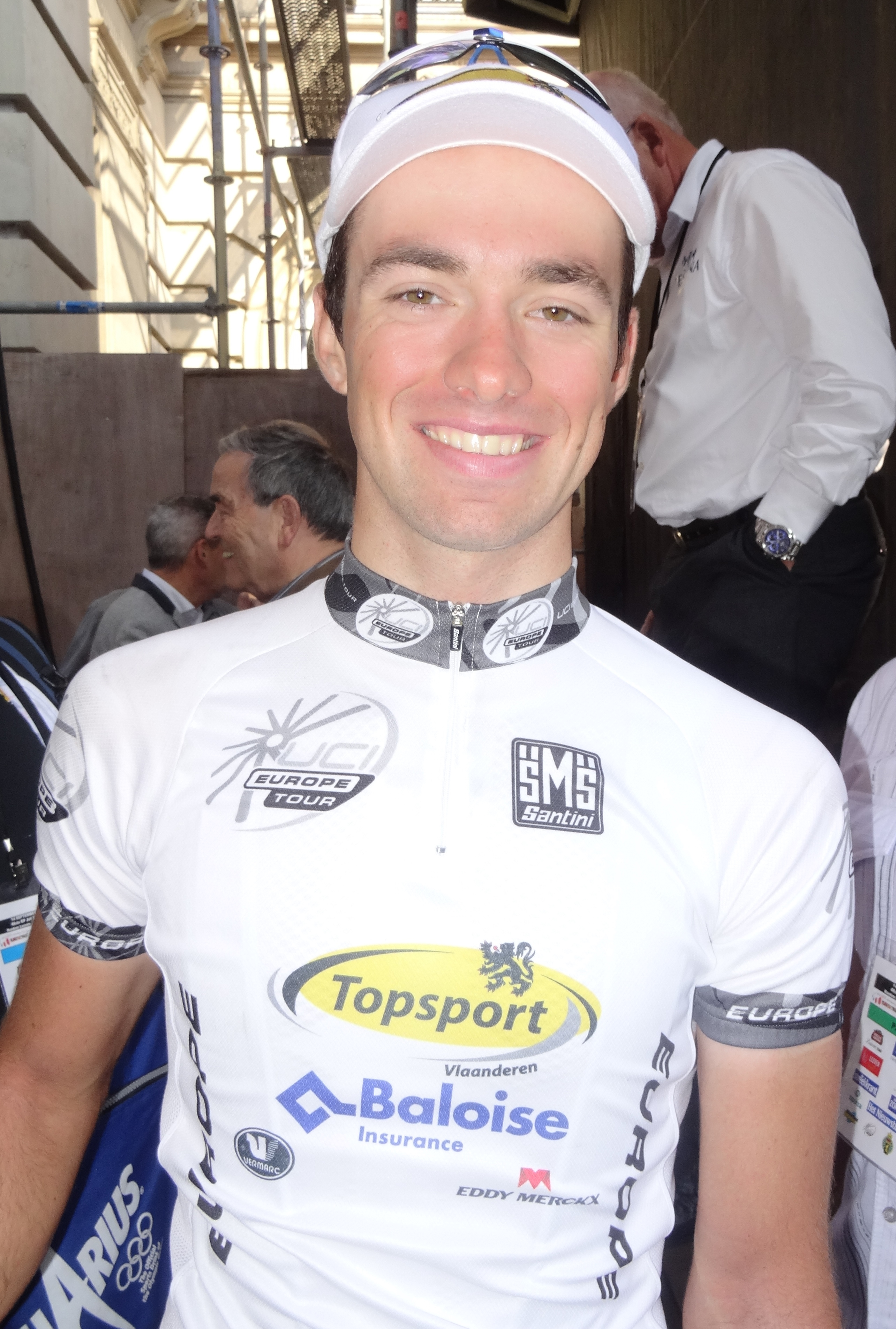 Reportage photographique réalisé le dimanche 14 septembre à l'occasion du départ et de l'arrivée du Grand Prix Jef Scherens 2014 à Louvain, Belgique.